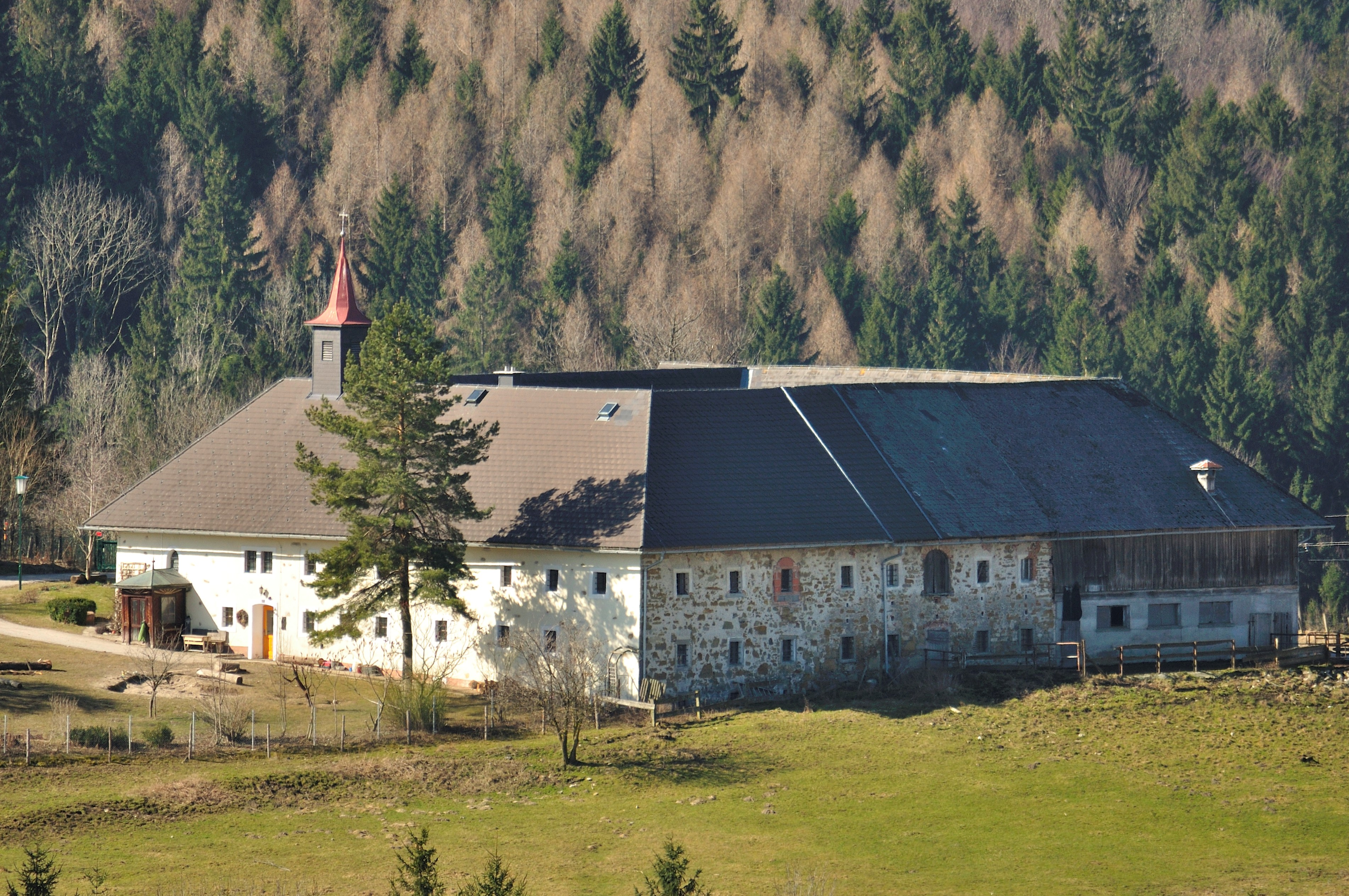 Das Schiefergut in Oberschlierbach mit der Schieferkapelle.